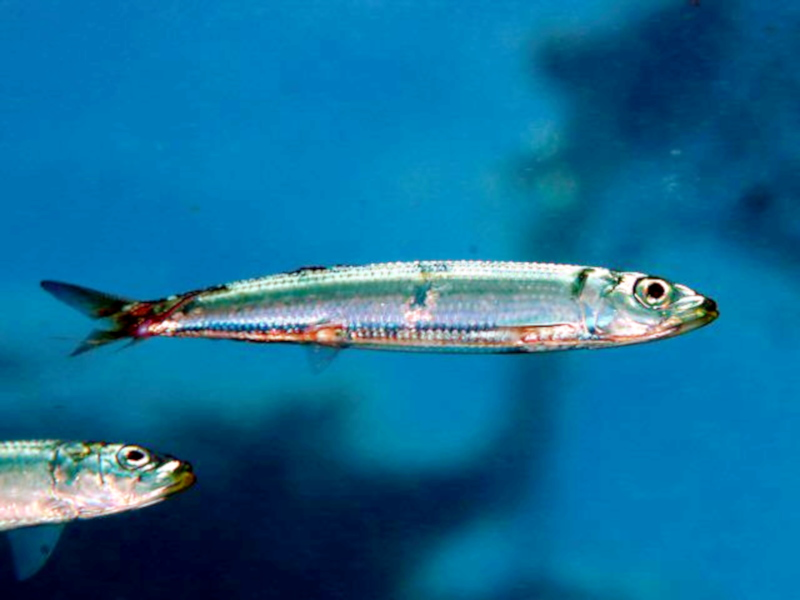 ウルメイワシ Etrumeus teres